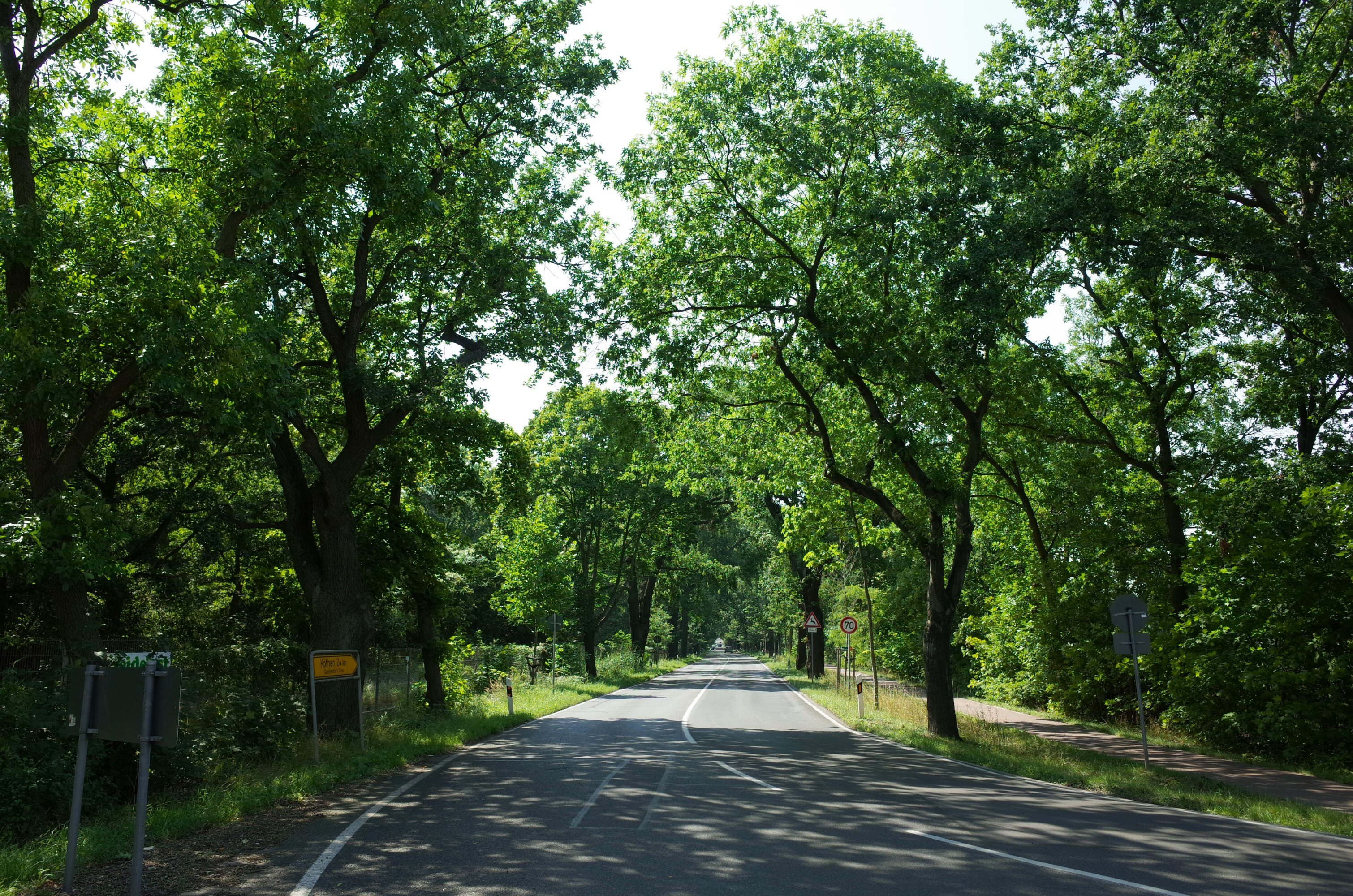 Dessau-Roßlau, Ortsteil Kochstedt, Allee Bergstraße, Kochstedter Kreisstraße (Baudenkmal im Denkmalverzeichniss Sachsen-Anhalt, Erfassungsnummer: 094 40936 000 000 000 000 [1])